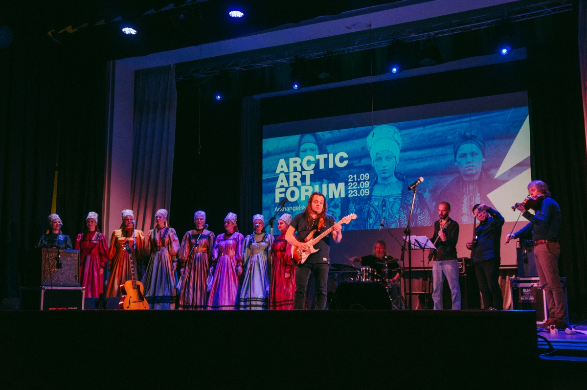 Arctic Art Forum 2016. Концерт открытия. Октет Государственного академического Северного русского народного хора. Халлгейр Педерсен, Михаил Звягин, Илья Ершов.